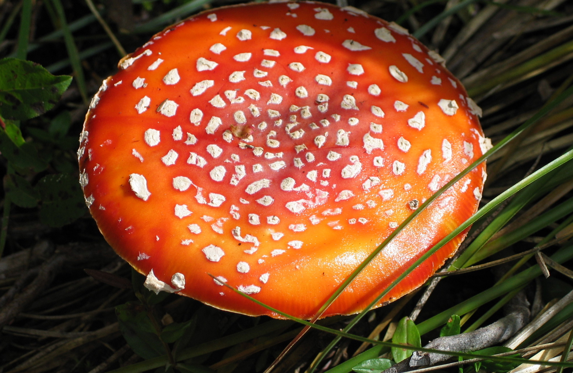 Amanita Muscaria